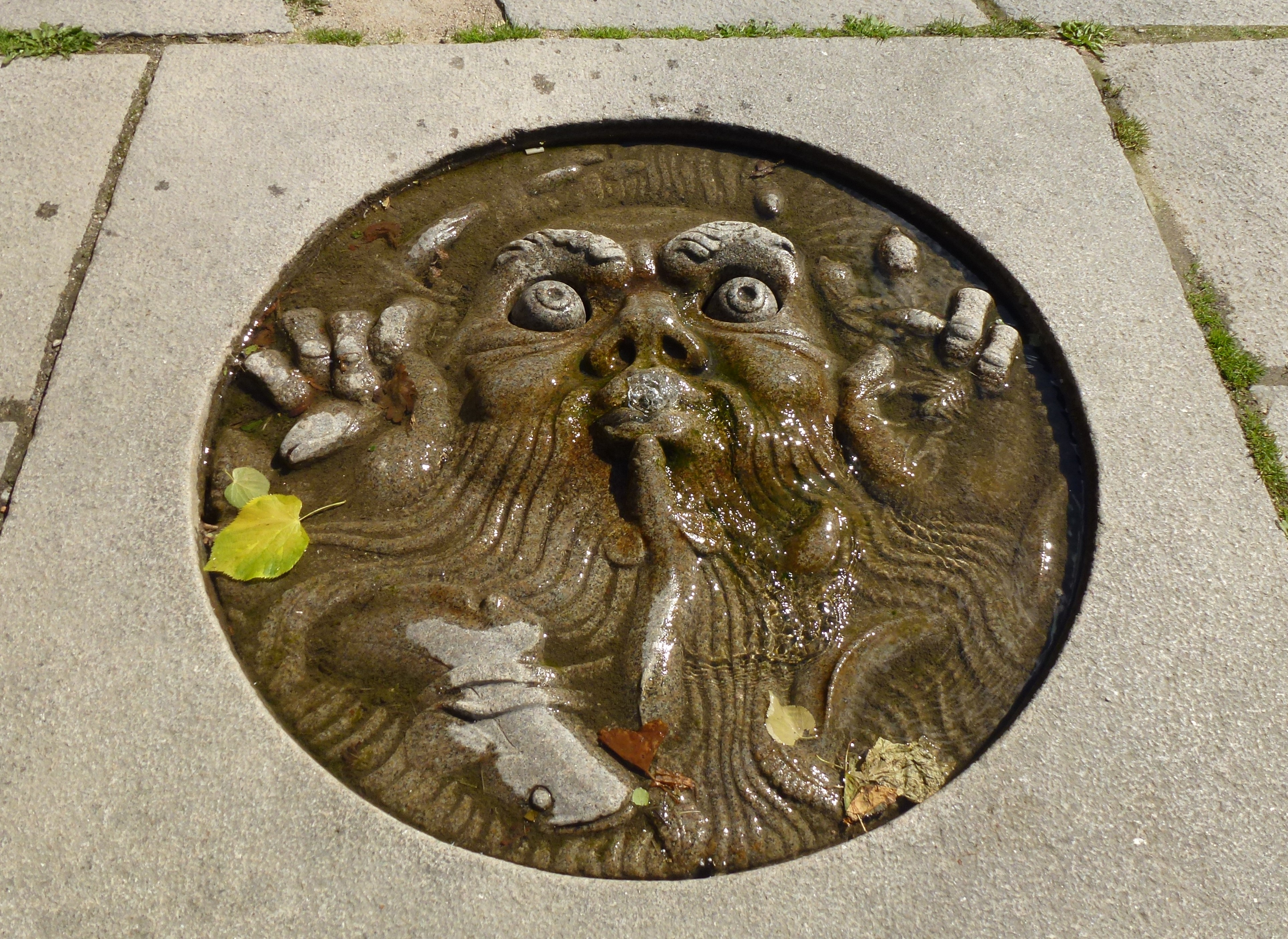 Stadshuset "Näcken" i Stadshusparken